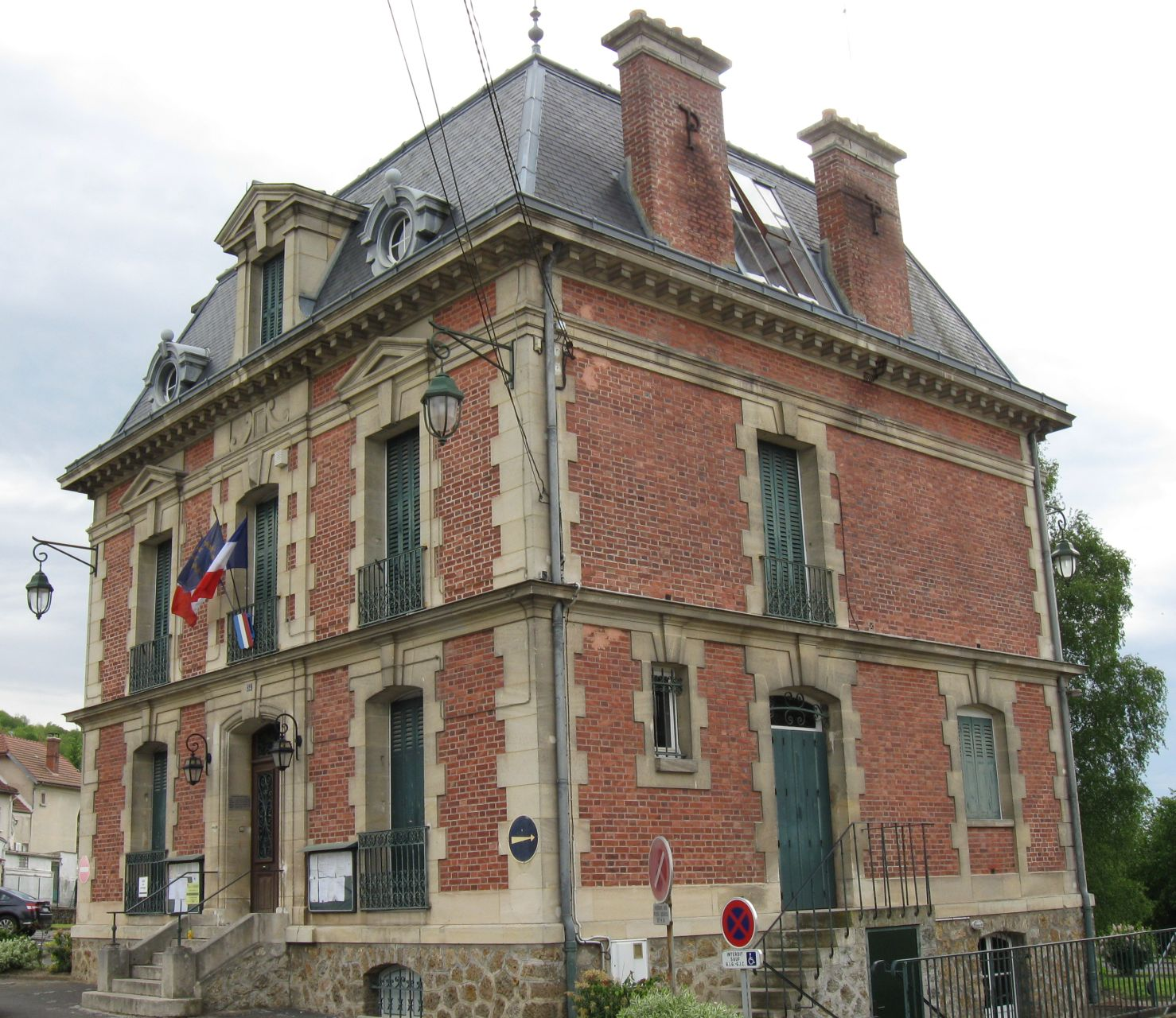 La mairie-école de Nogent-l'Artaud (Aisne , région Picardie)